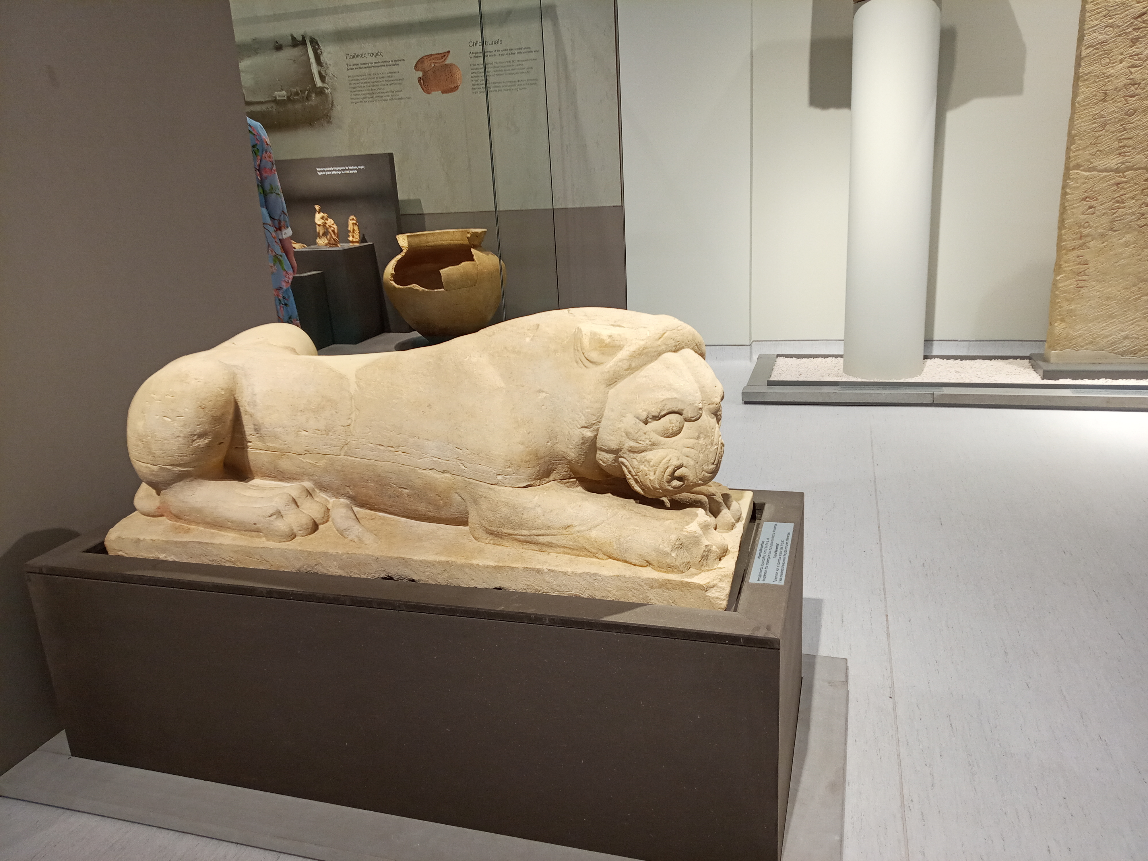 скульптура лева, острів Керкіра, Греція